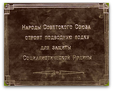 Закладная доска подводной лодки К-433 (сторона №1) The embedded Board a submarine K- 433 (side №1)